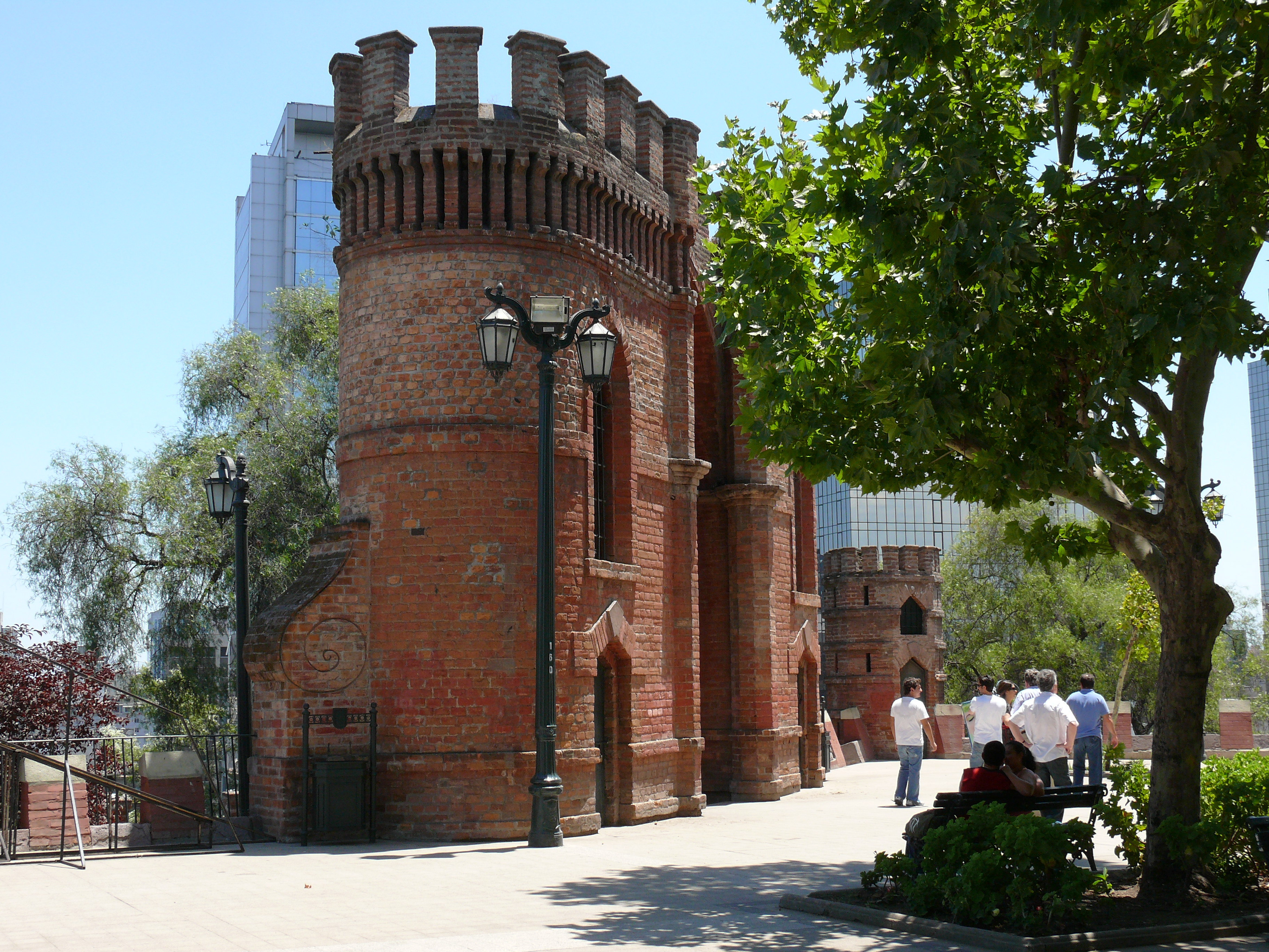 Portal de Ladrillos en el Cerro Santa Lucía This is a photo of a national monument in Chile: 226